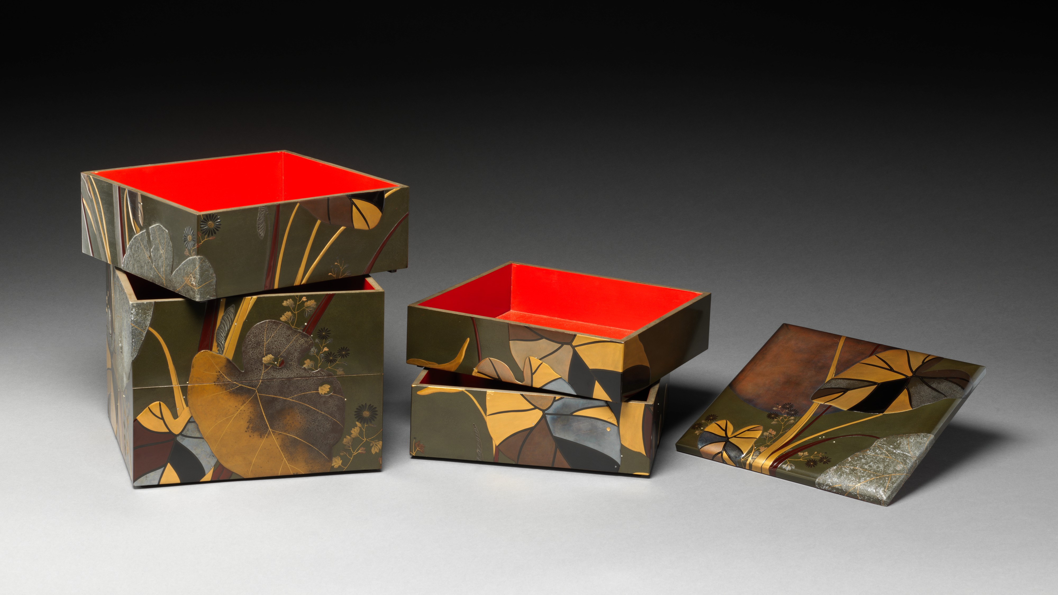 Japan; Box; Lacquer